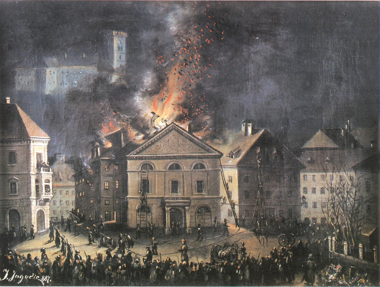 Stanovsko gledališče v ognju